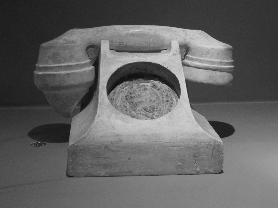 Ericssons bakelittelefon gipsmodellen från omkring 1930